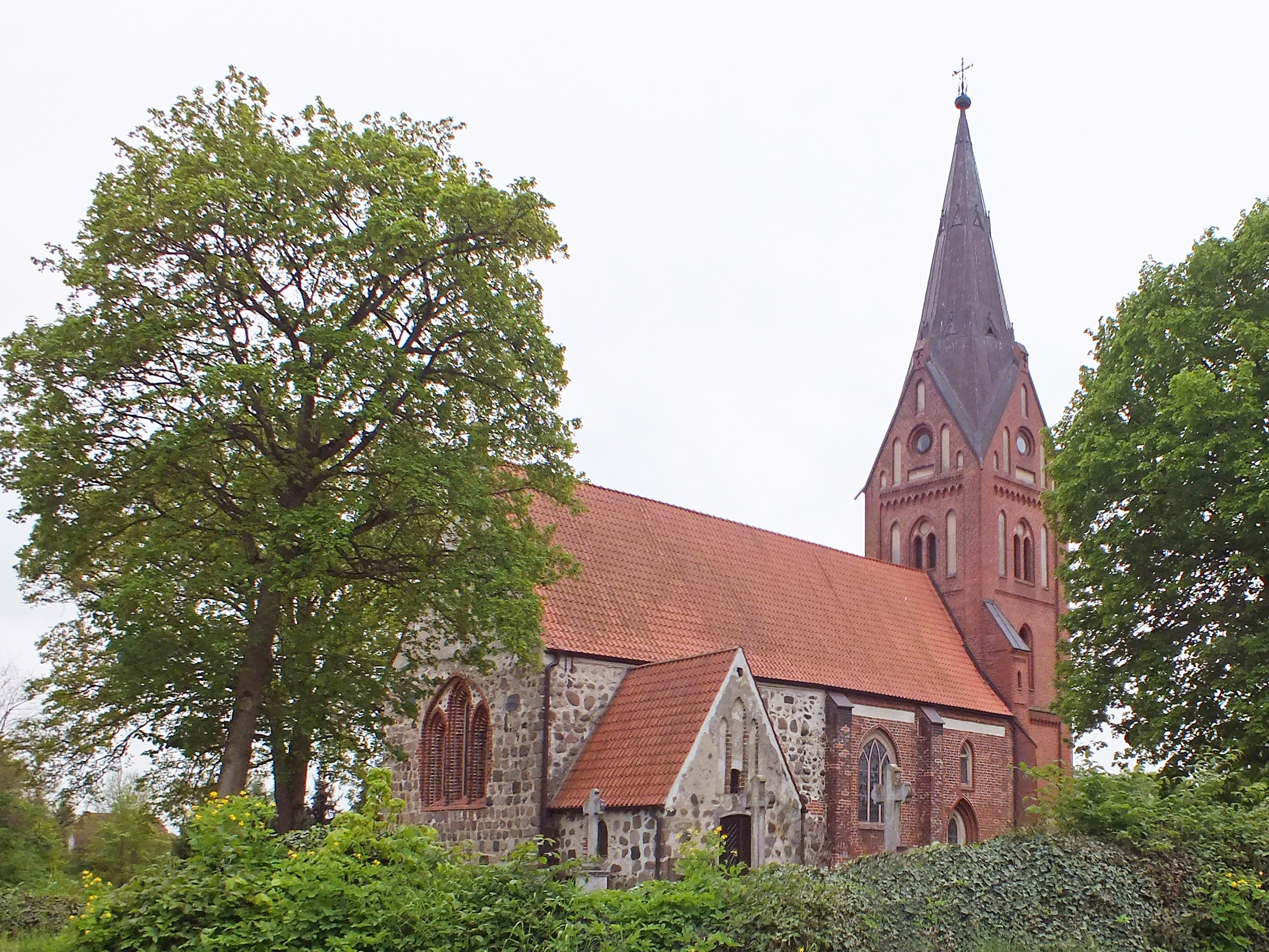 Die Kirche in Hanshagen